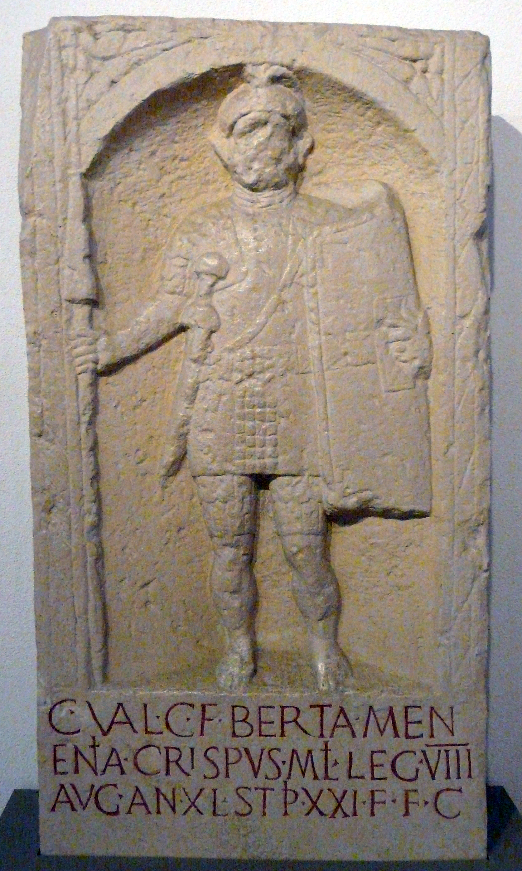 CIL XIII 07574 aus Aquae Mattiacorum/Wiesbaden im Saalburgmuseum